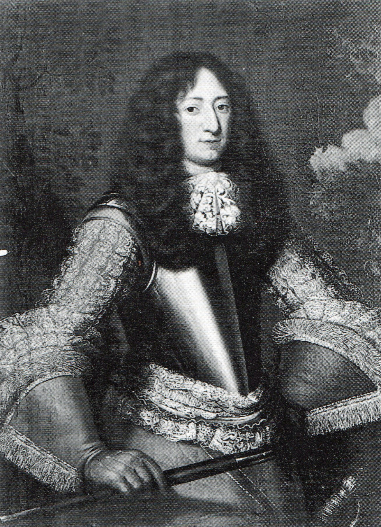 Ölgemälde von Kurprinz Karl Emil von Brandenburg, Sohn des Großen Kurfürsten Friedrich Wilhelm. Früher im Berliner Stadtschloss, jetzt als Kriegsbeute im Staatlichen Puschkin-Museum Moskau.